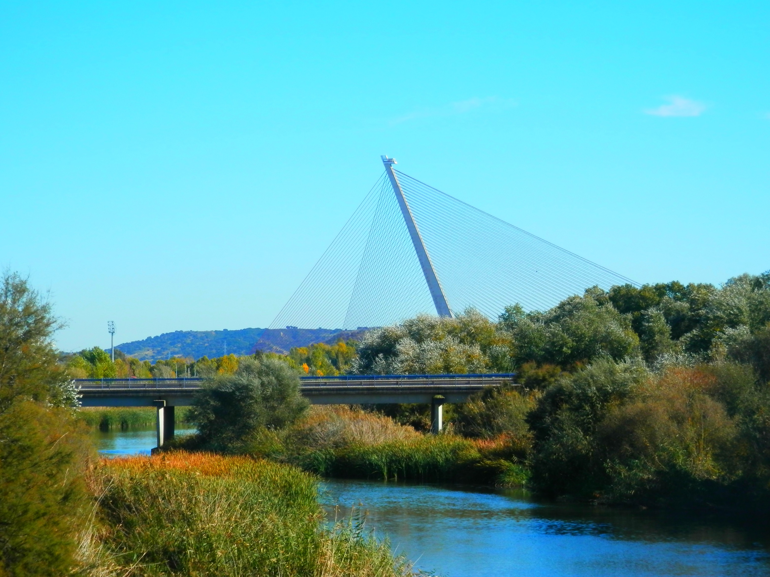 Puente Castilla-La Mancha